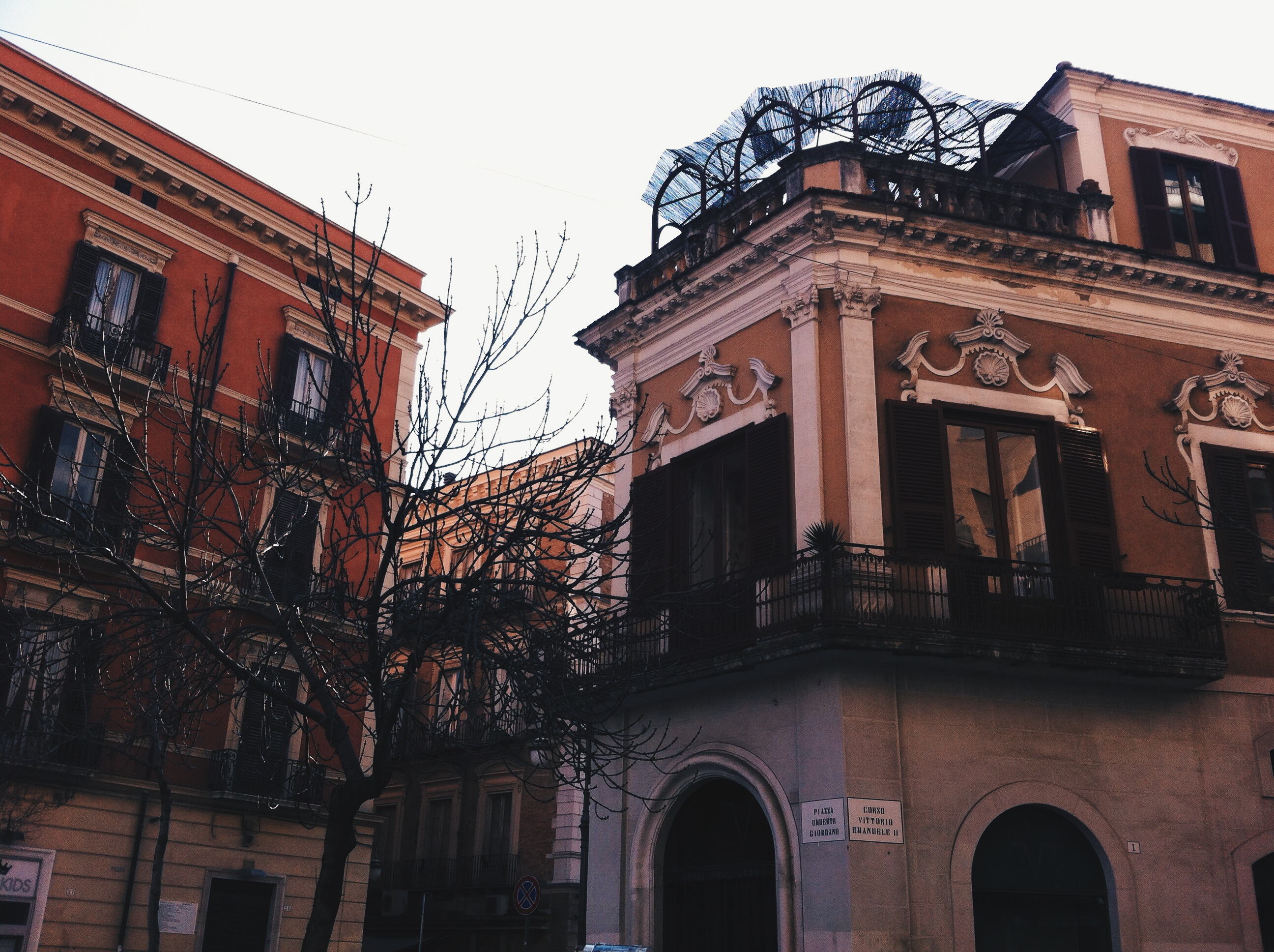 Zona Pedonale,Foggia